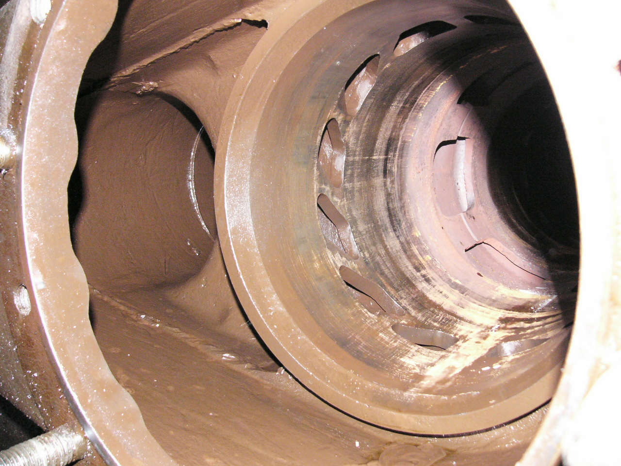 Schieberbuchsen der 41 1144-9 im Zylinderblock